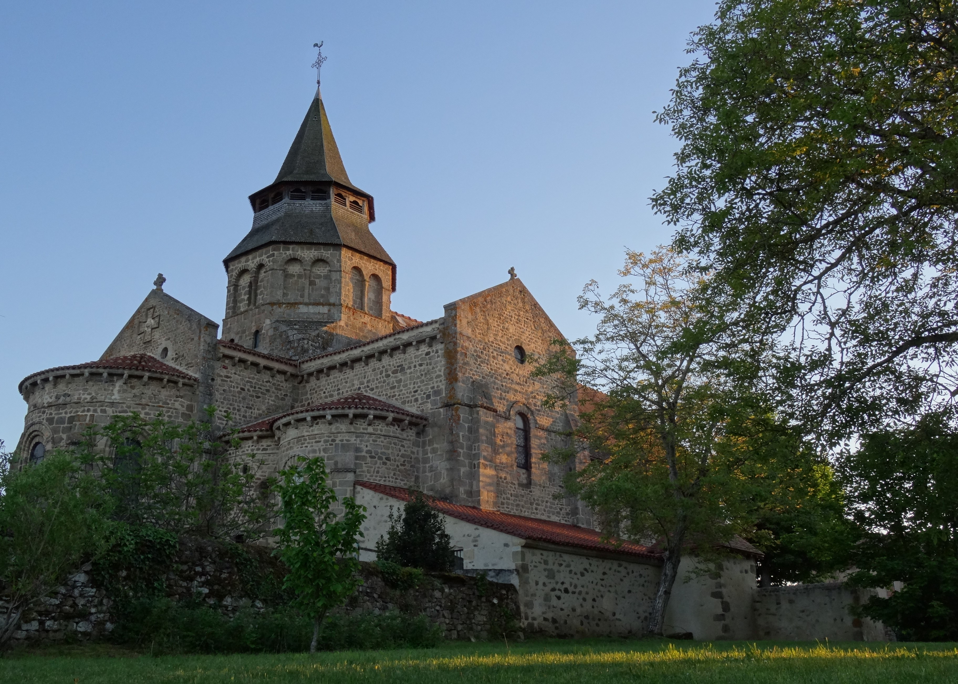 Un beau modèle d'église romane , en Bourbonnais .